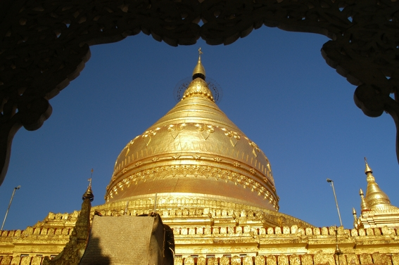 Die vergoldete und von weit sichtbare Shwezigon-Pagode